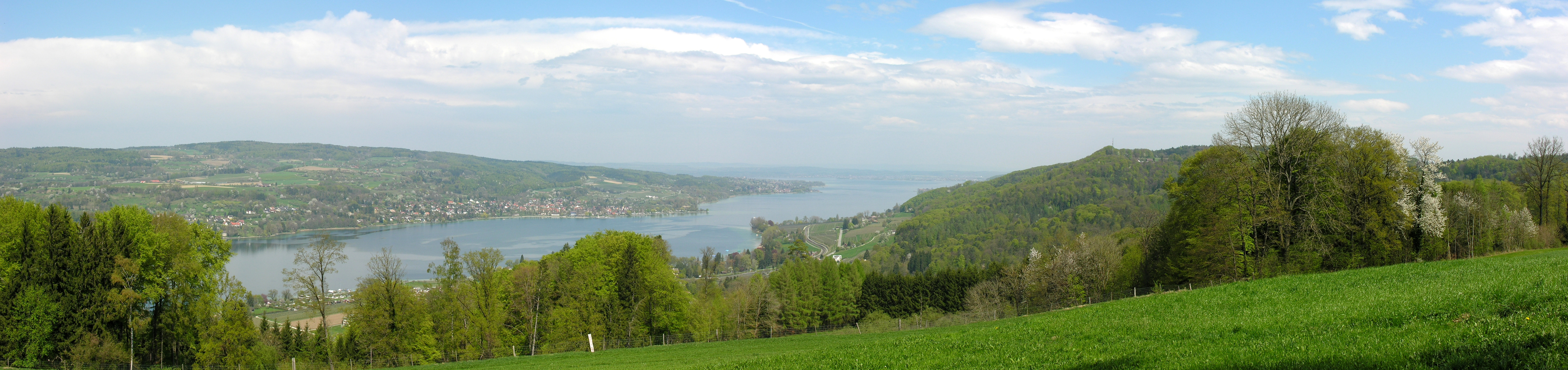 Switzerland, Thurgau, Lake Constance seen from Klingenzell